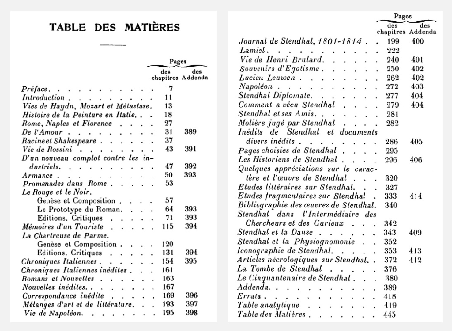 Table des matières, Histoire des œuvres de Stendhal, Paupe, 1903, p. 445-446